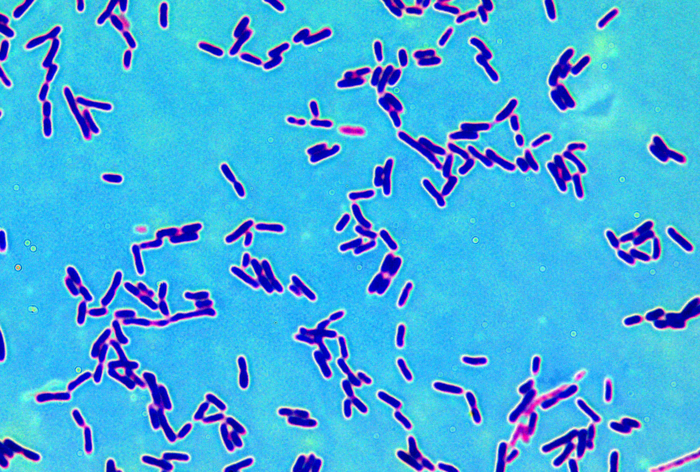 microscopio Olympus 1000 x, colorazione Diff Quik